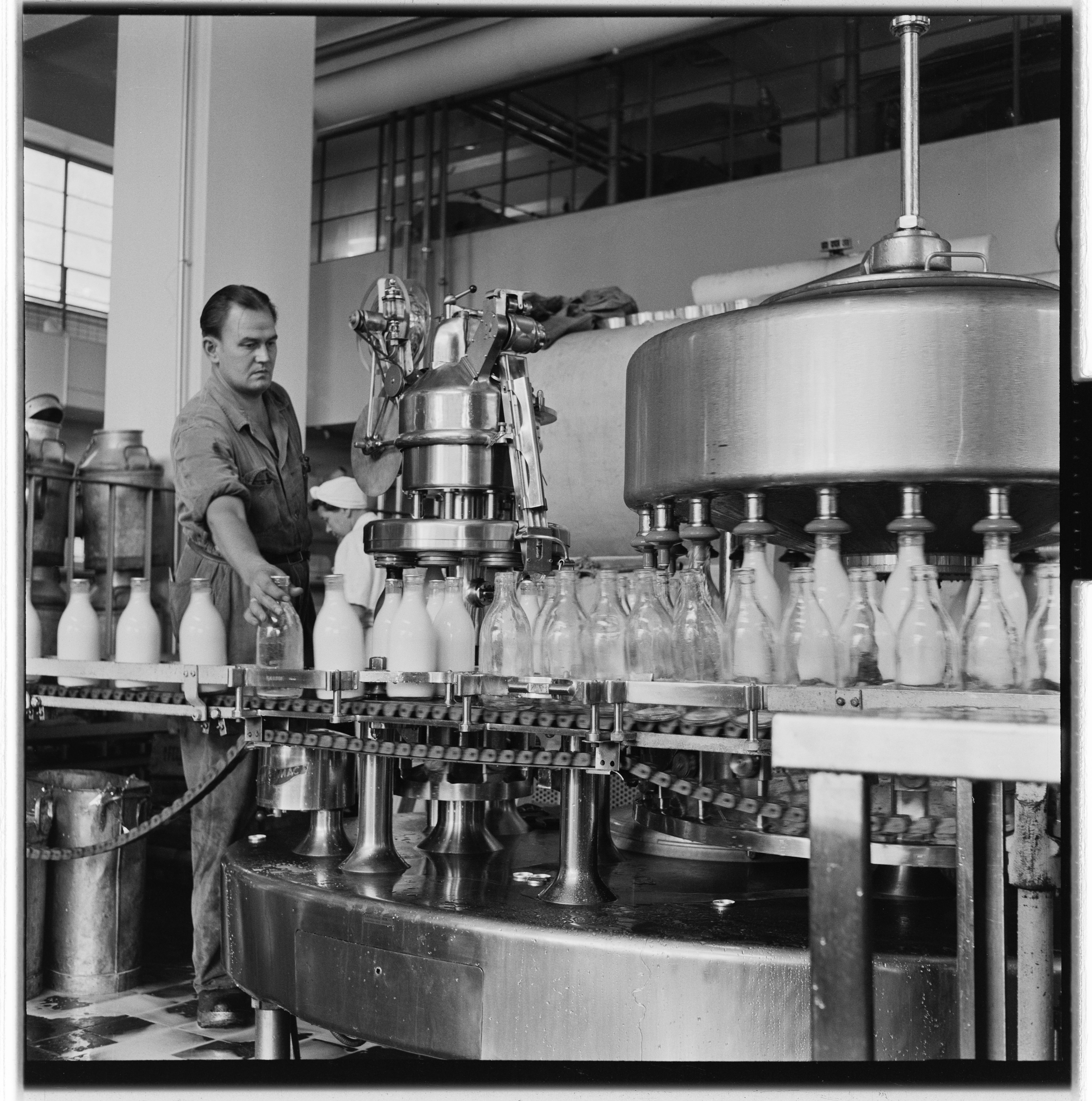 Bildet er hentet fra Arkivverket. Melkekø. NÅ nr. 36, 1955 Arkivinstitusjon : Riksarkivet Arkivnavn : Billedbladet NÅ Sted : Norge, Ukjent, Ukjent, Emneord: Melk, produksjon Avbildet